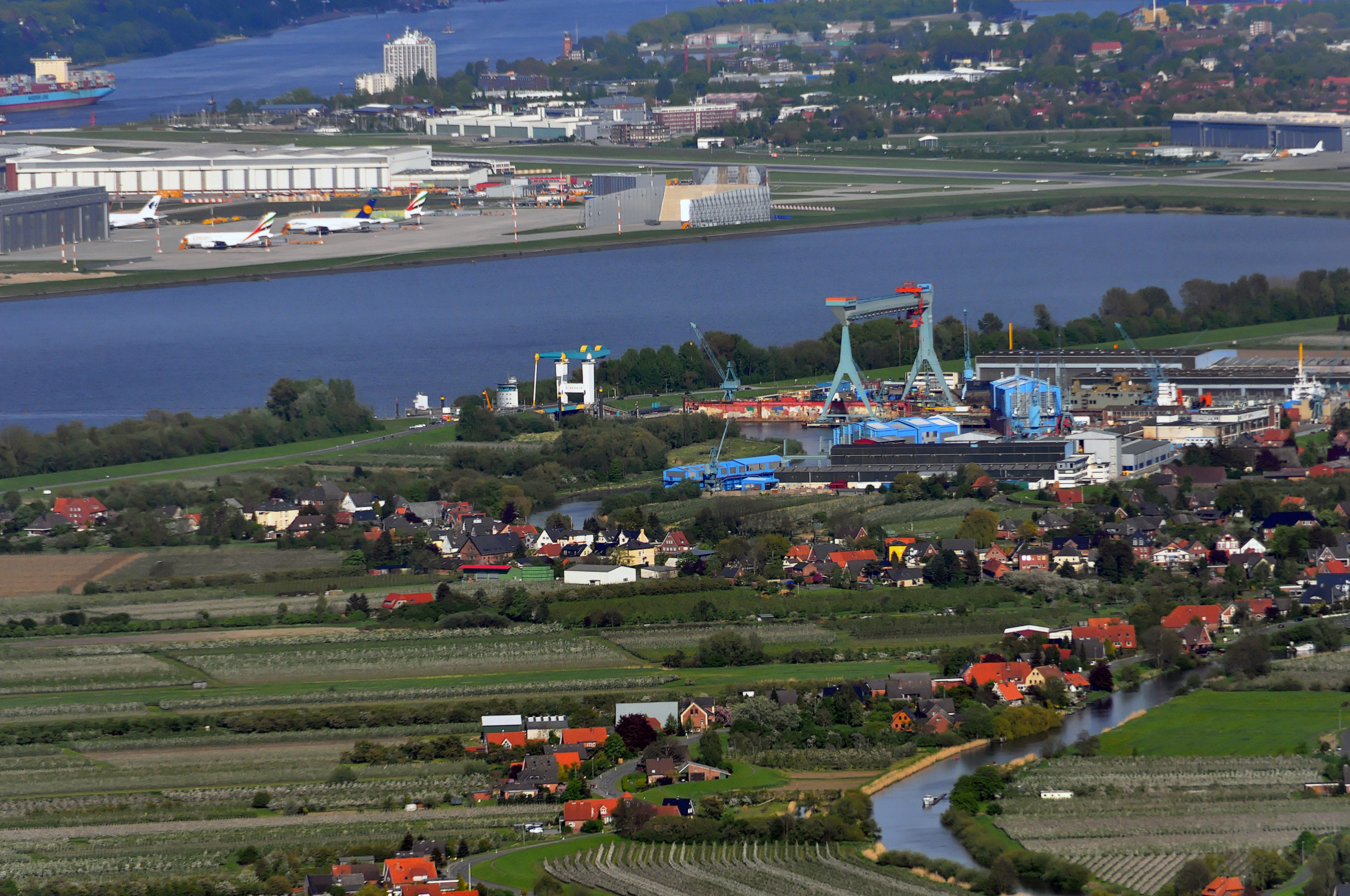 Luftbilder von der Nordseeküste 2012-05